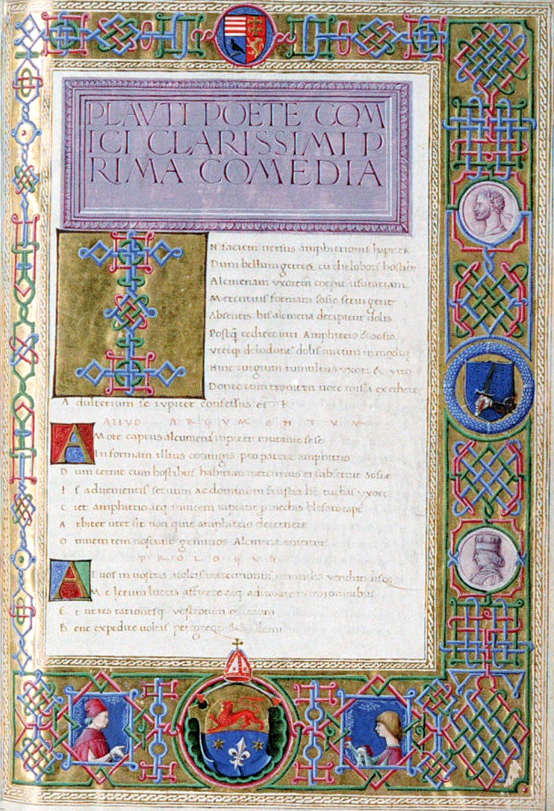 Vitéz János Plautus-kódexének címlapja alul a saját és Janus Pannonius állítólagos képmásával